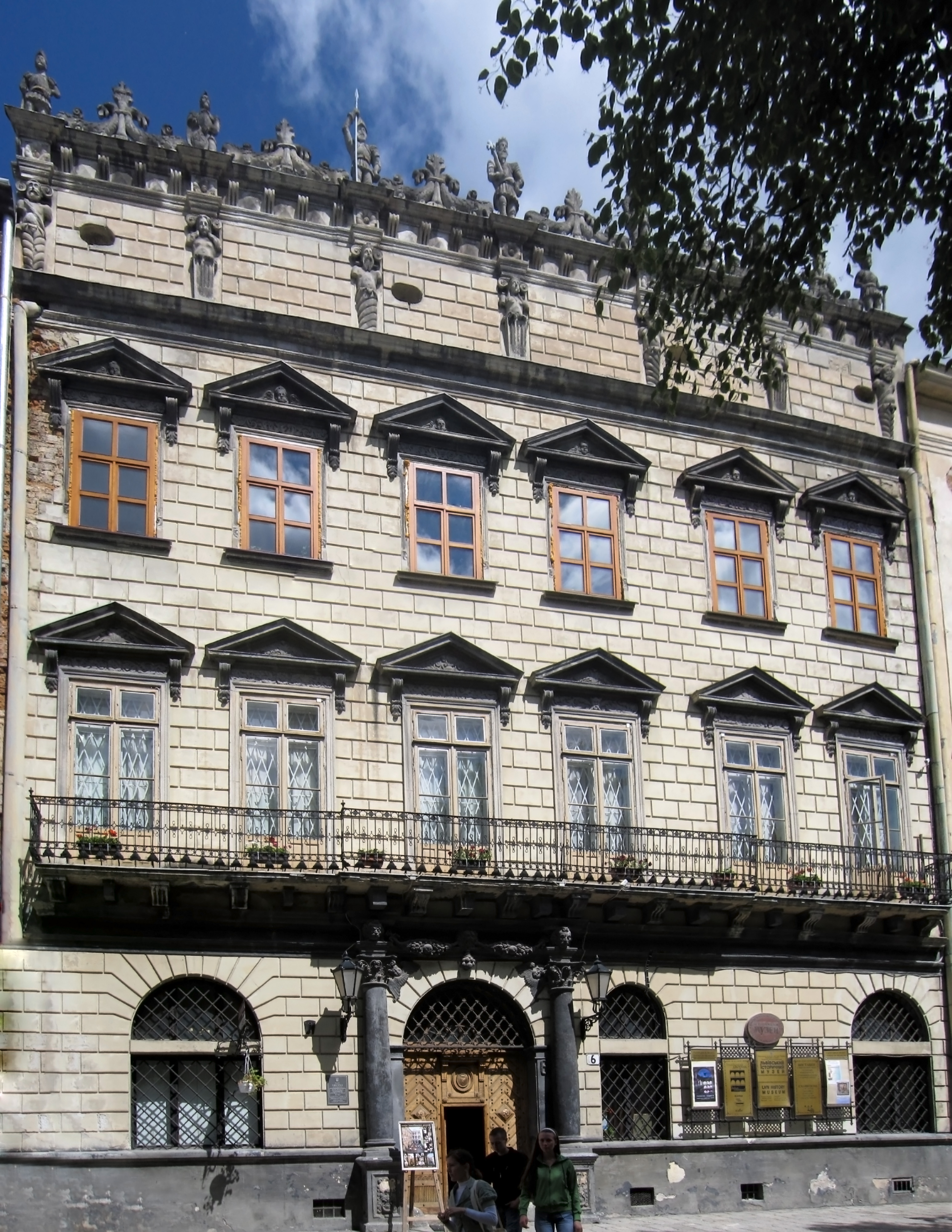 Rynek of Lwow